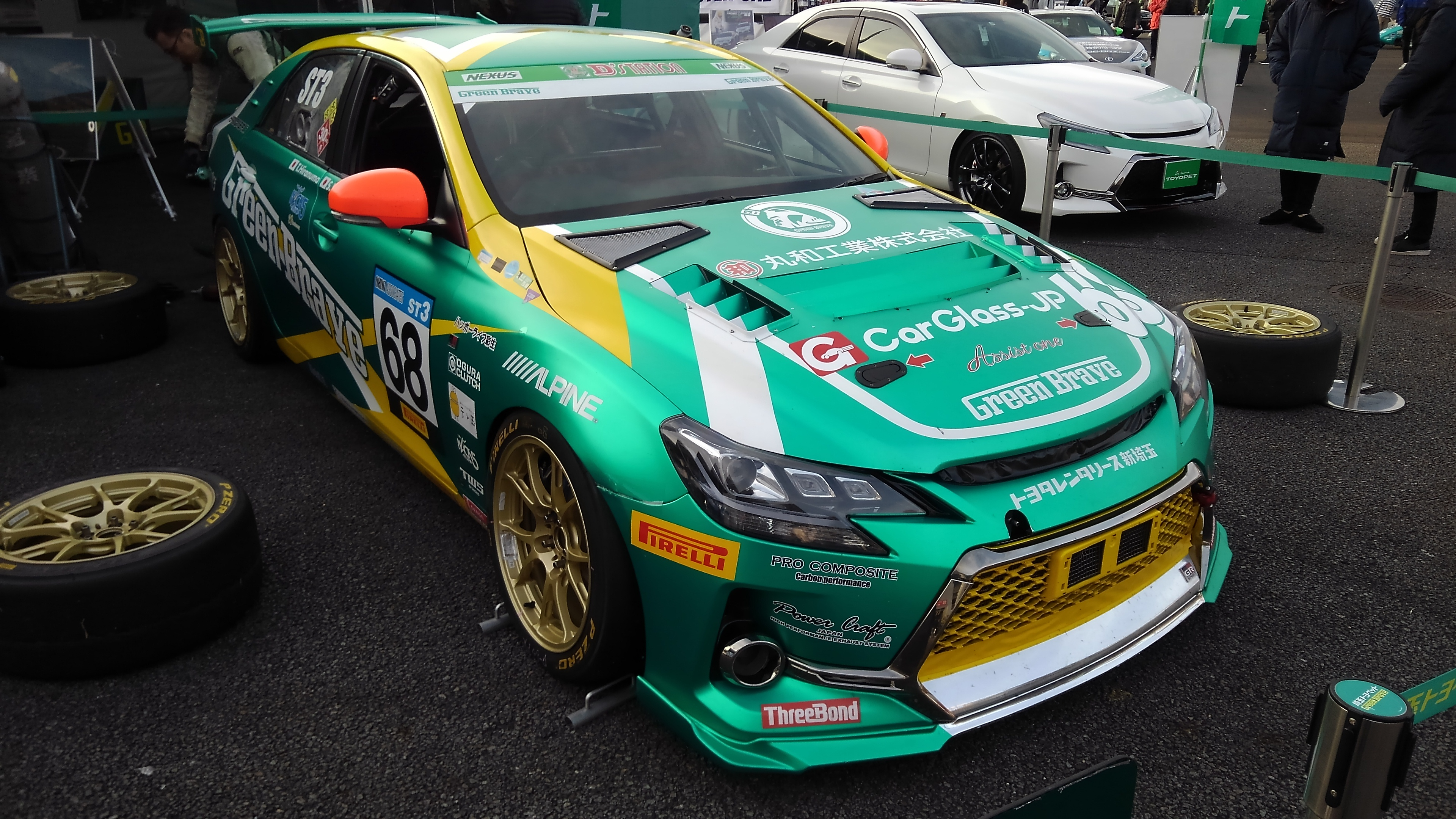 2018年TGRFにて、埼玉トヨペット GreenBraveのマークX MC